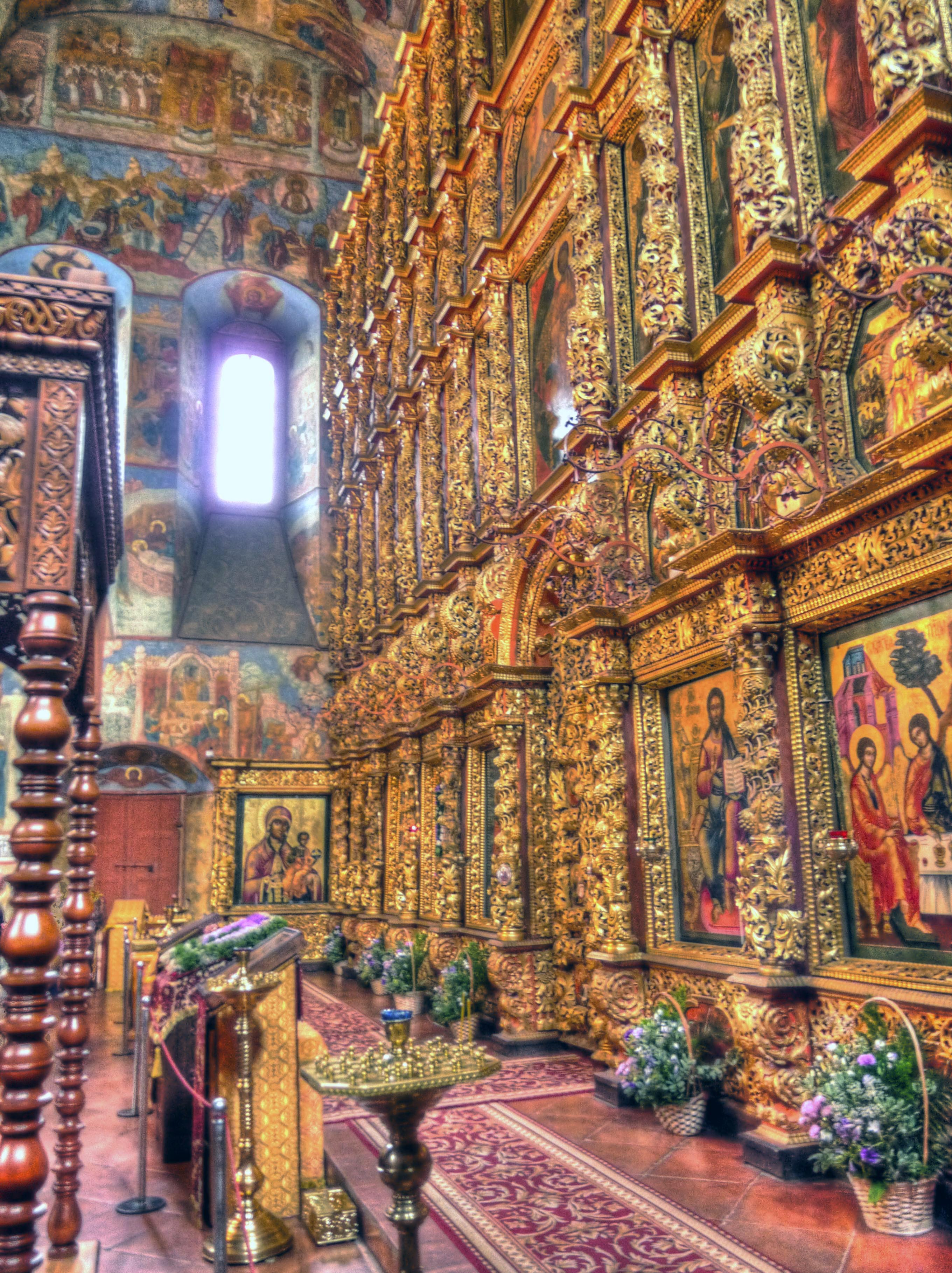 Kostroma Ipayevsky Monastery 16 HDR